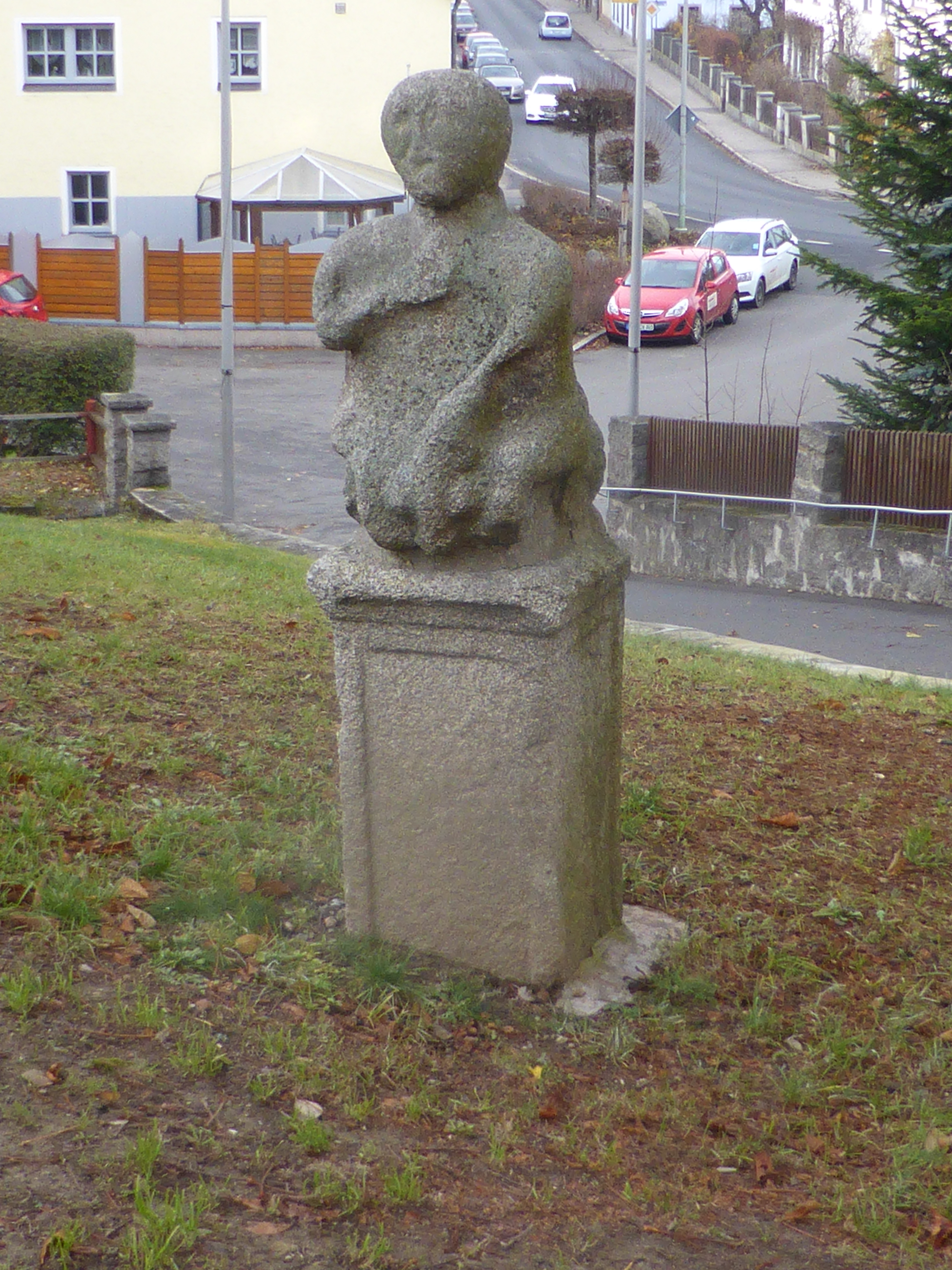 Ehemaliges Pflegschloss (Floß)